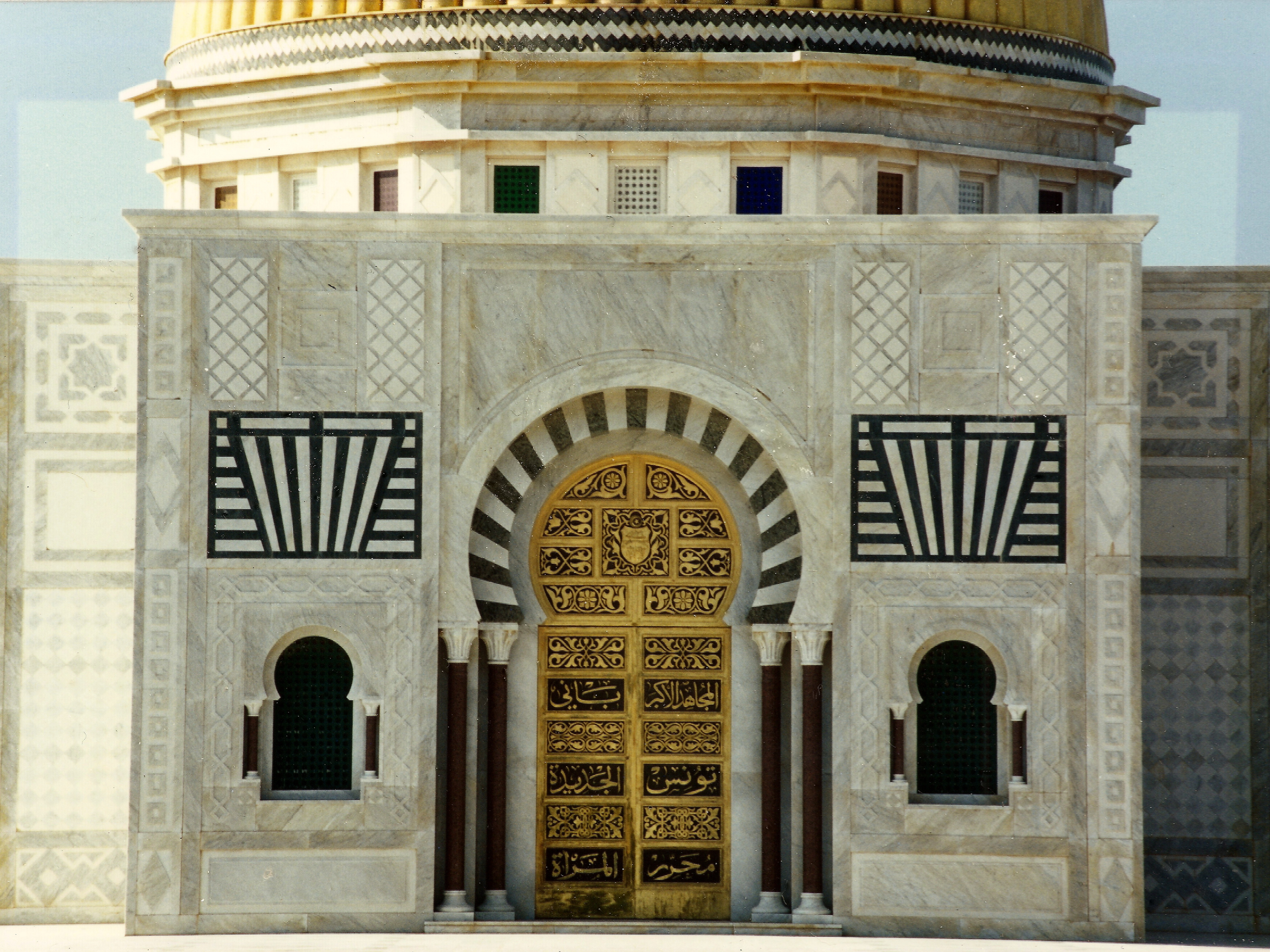 Habib Bourgiba's mausoleum in Monastir, Tunisia.